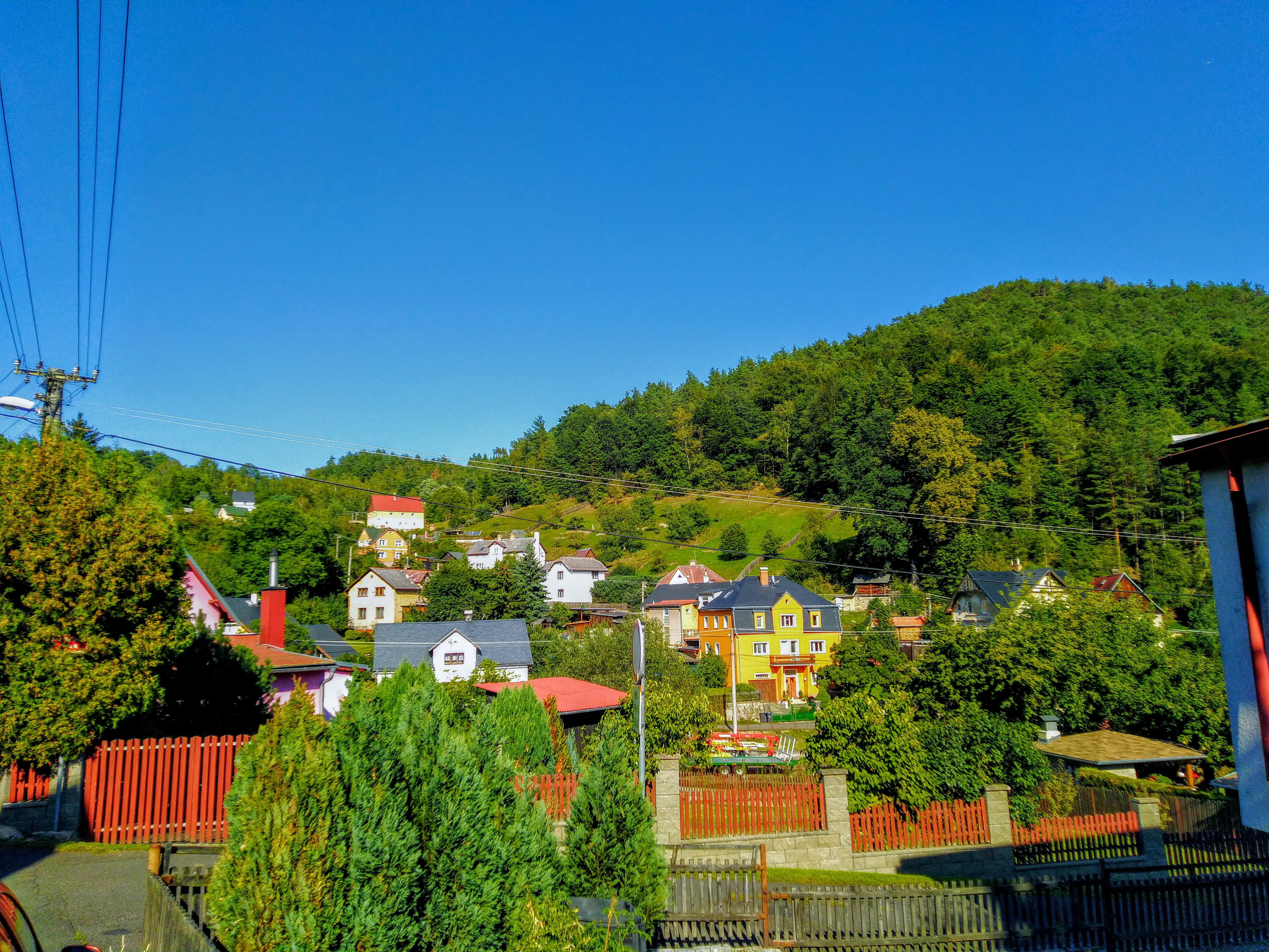 Nová Ves (Děčín XX), pohled z Dukelské ulice.